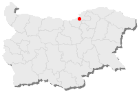 Karte Bulgarien - Iwanowo (Bezirk Russe) markiert